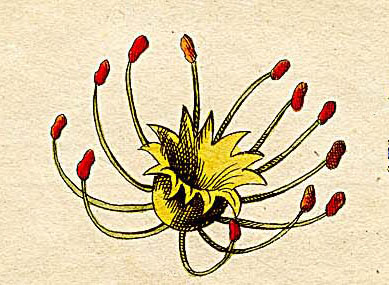 Ausschnitt (Klasse XI) aus Ehrets Tafel "Methodus Plantarum Sexualis"